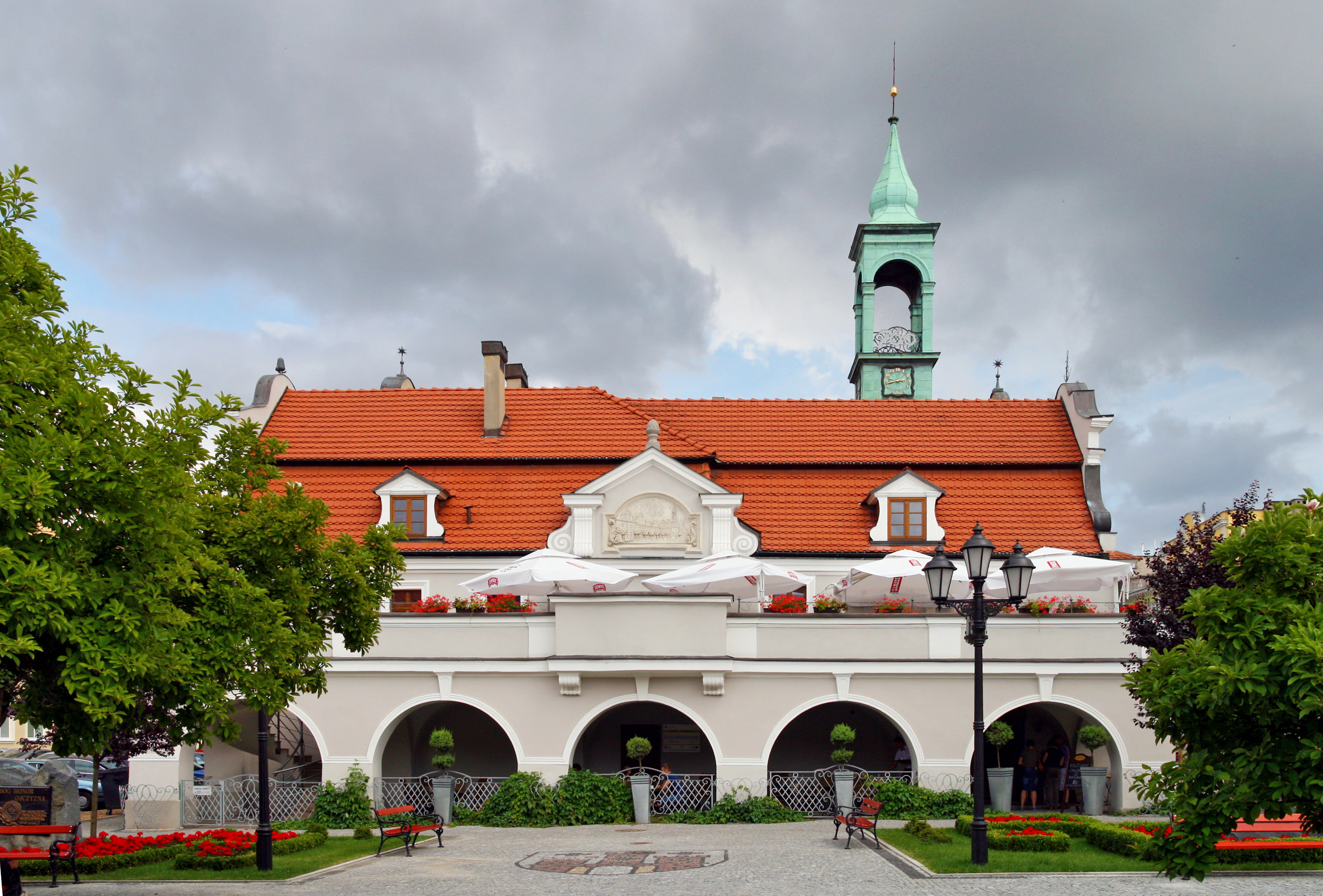 Ratusz w Kluczborku.